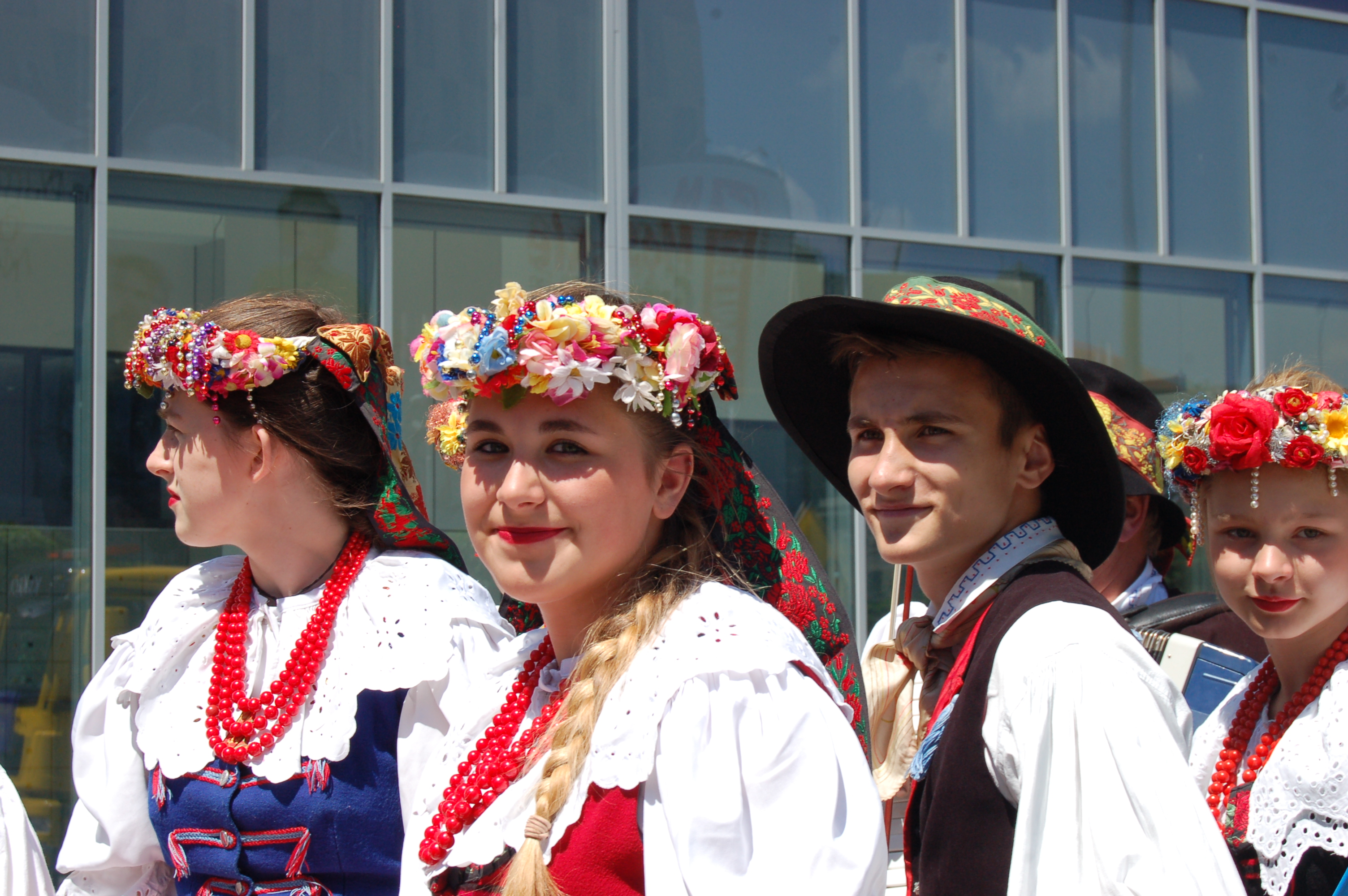 Marsz Autonomii 2015 / Autonomy March 2015